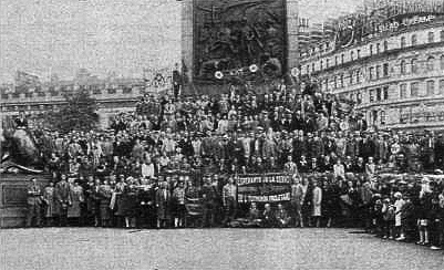 10-a SAT-kongreso en Londono, aŭgusto 1930. Komuna foto antaŭ la Nelson-kolono sur Trafalgar-placo.